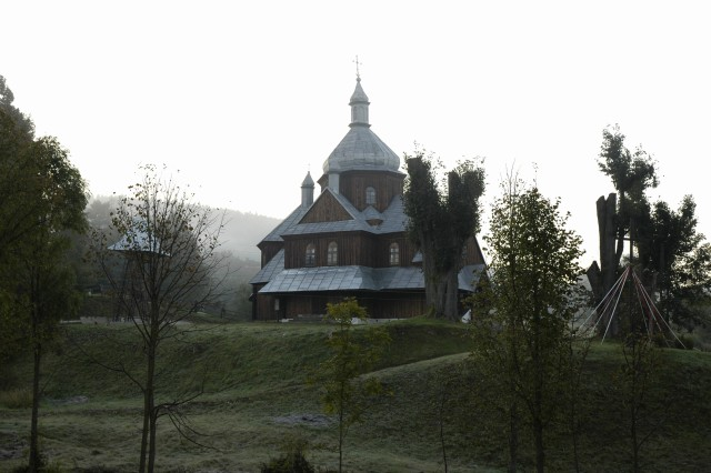 Poland, Hoszów - wooden church.